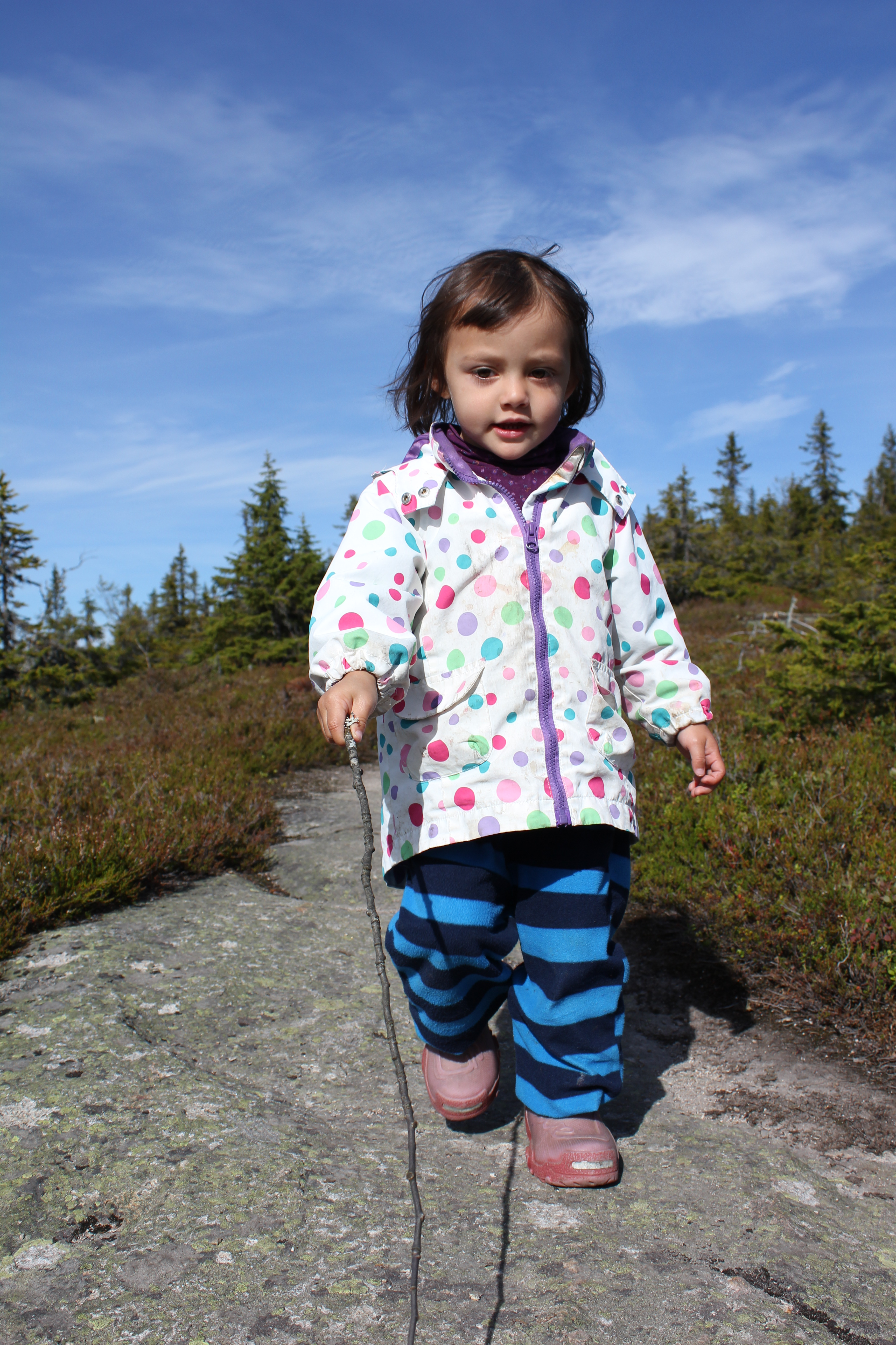 Den glade vandringsjenta.